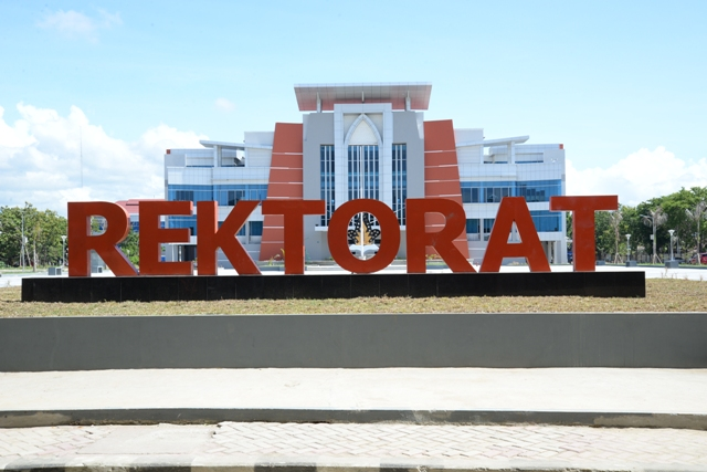 Gedung Rektorat Universitas Negeri Gorontalo